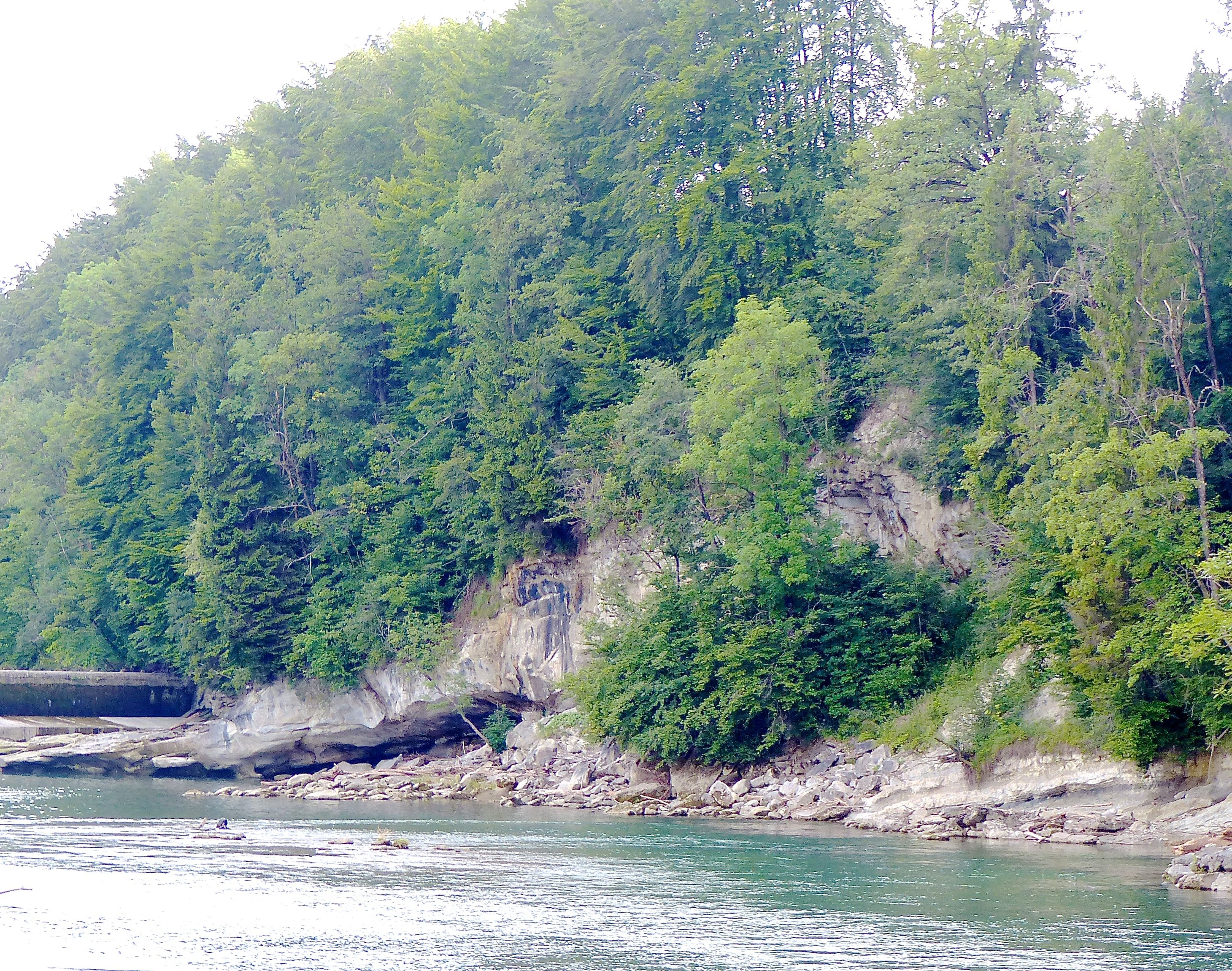 Geotop: Illerdurchbruch bei Oberkottern; Felsen am westlichen Illerufer